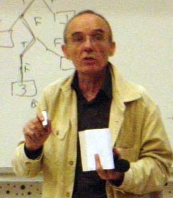 Jean Pierre Jouannaud faisant un exposé le 29 mai 2008